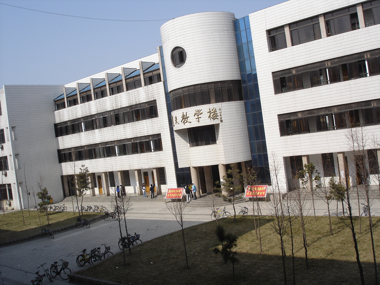 中文（中国大陆）: 潍坊市第一中学逸夫教学楼